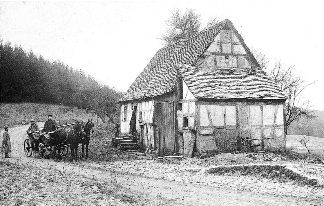 Das letzte Gebäude der Wildung Pferdsbach in Büdingen. Vor der Haustür der letzte Bewohner, Herr Jeck, im Jagdwagen der Fürst und zwei seiner Forstbeamten